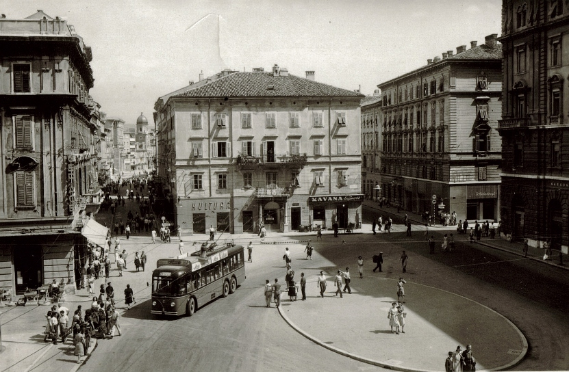 jadranski trg, nekad